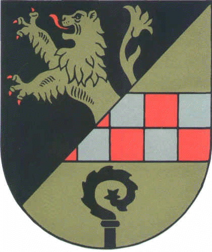 Wappen von Belgweiler